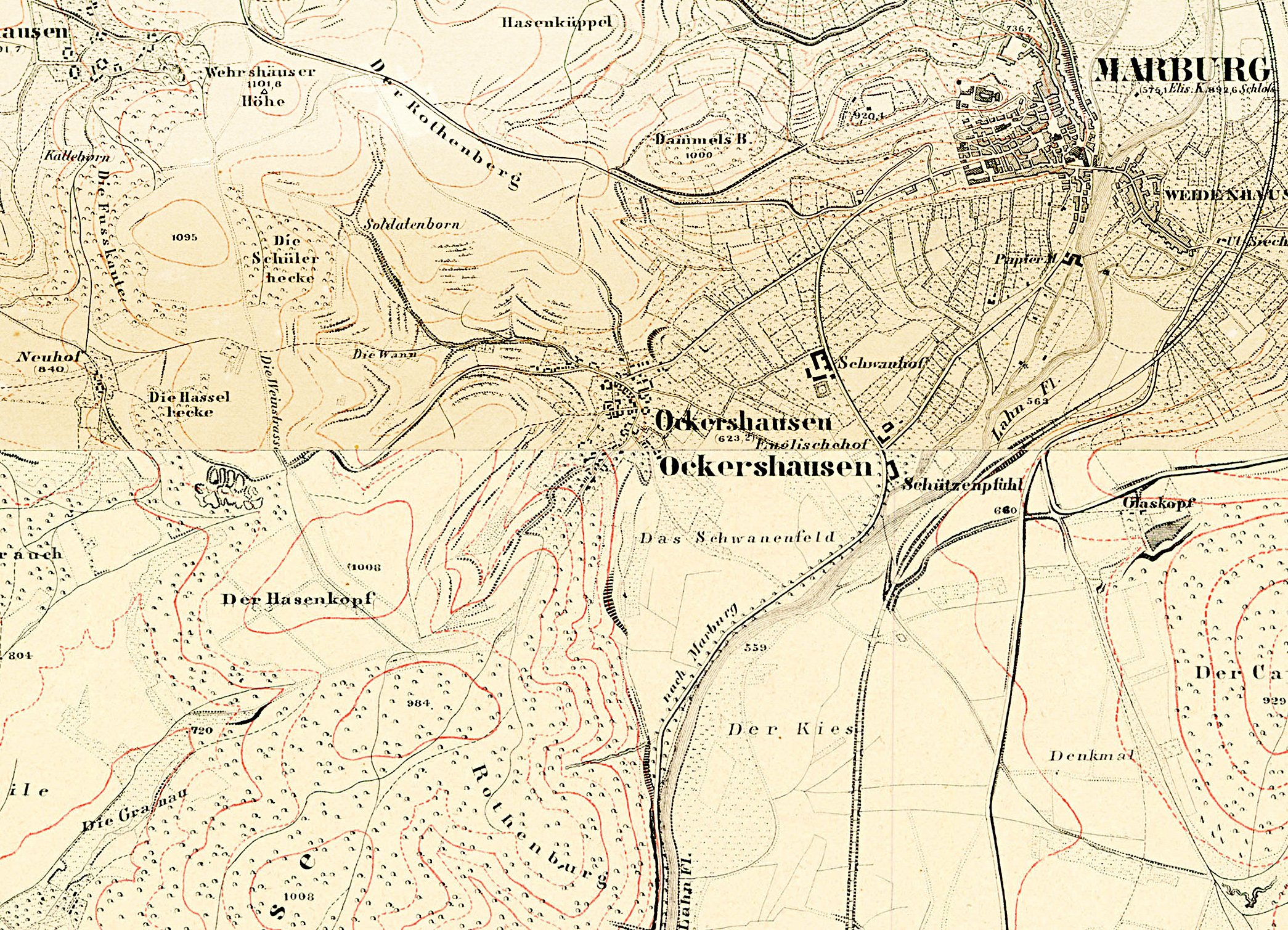 Topografische Karte von Ockershausen bei Marburg (1:25000).